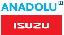 Logos der Anadolu Isuzu